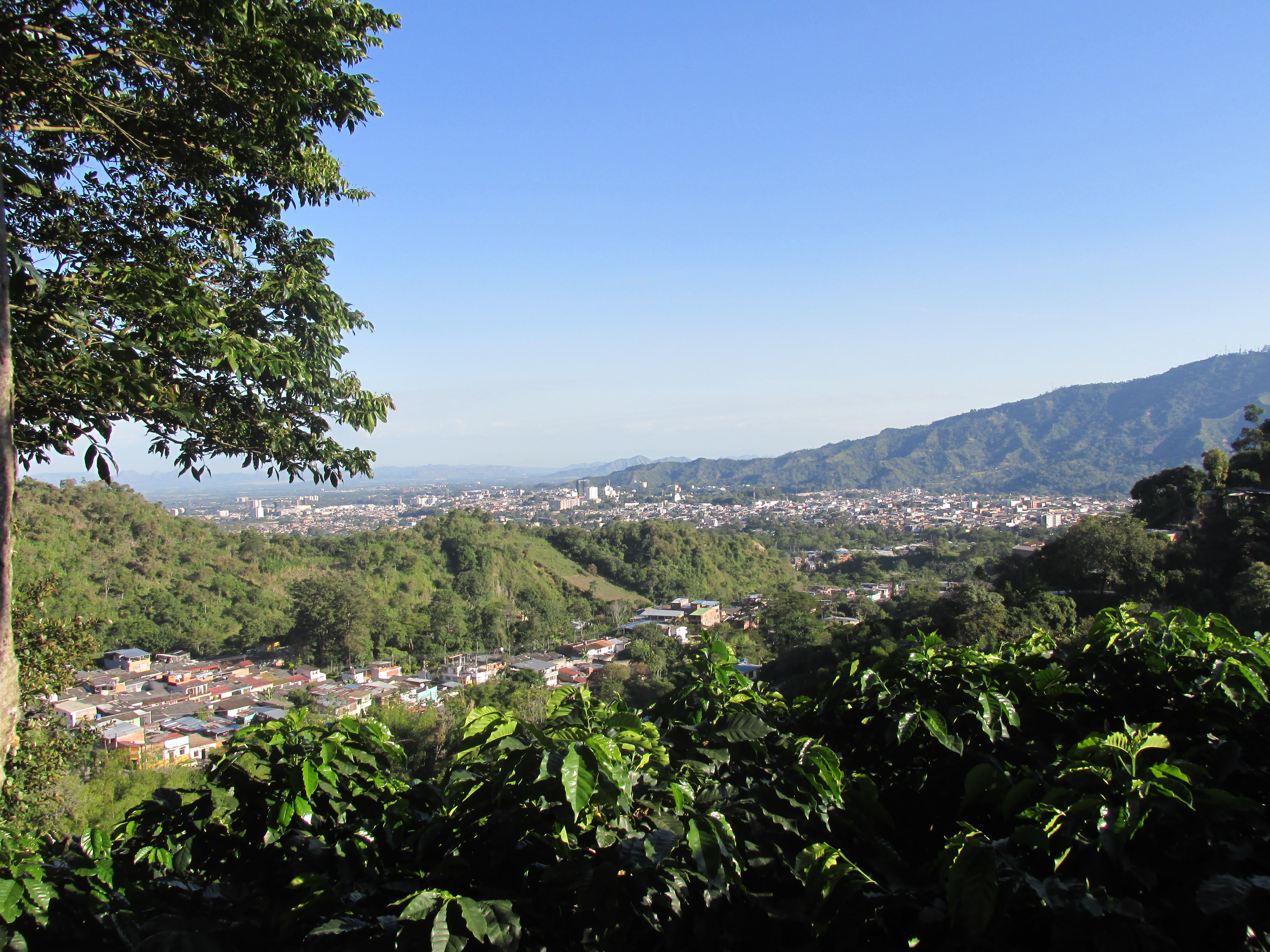 Panorama de Ibagué desde el este